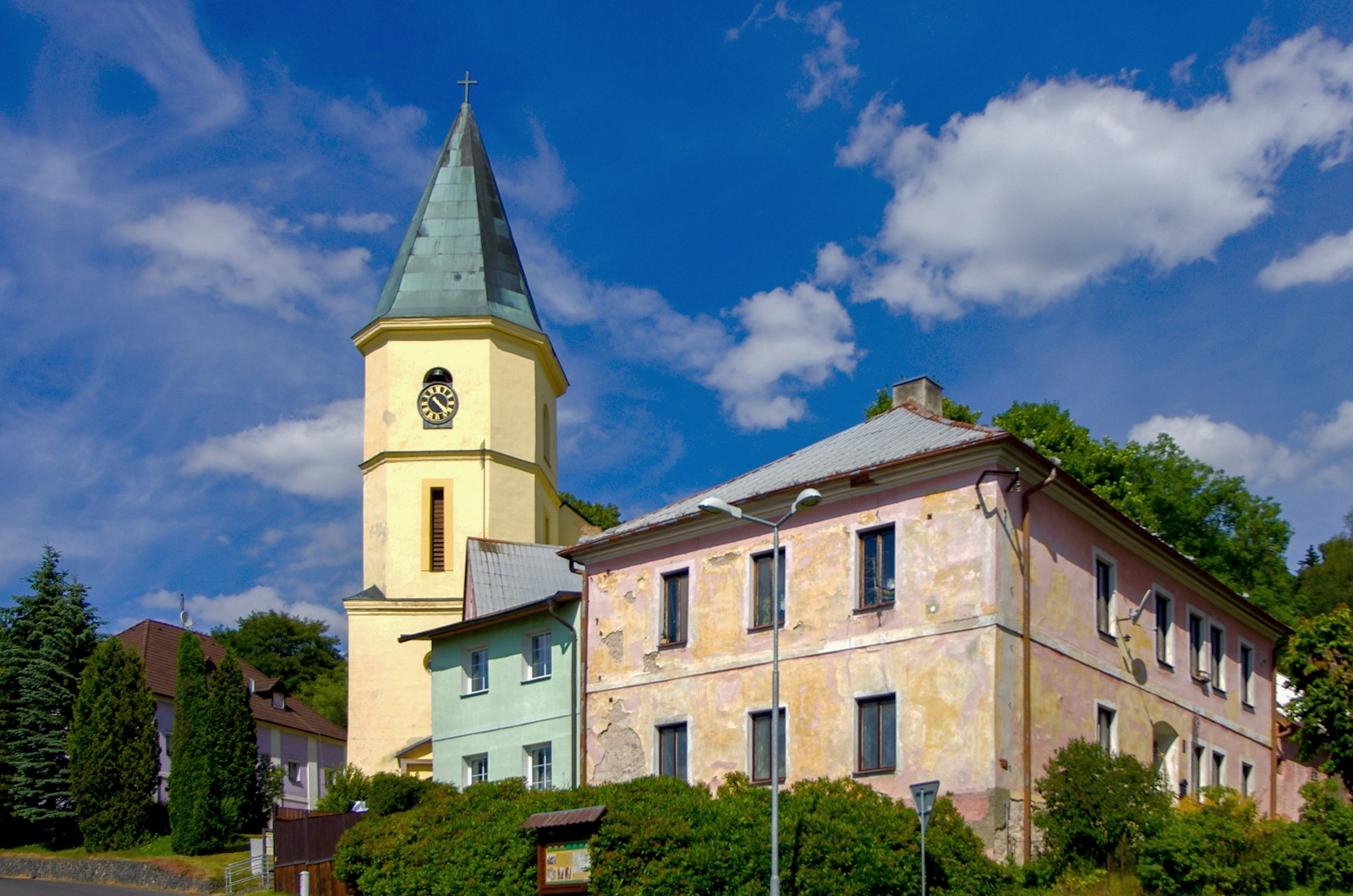 kulturní památka - kostel sv.Markéty, Lázně Kynžvart, okres Cheb